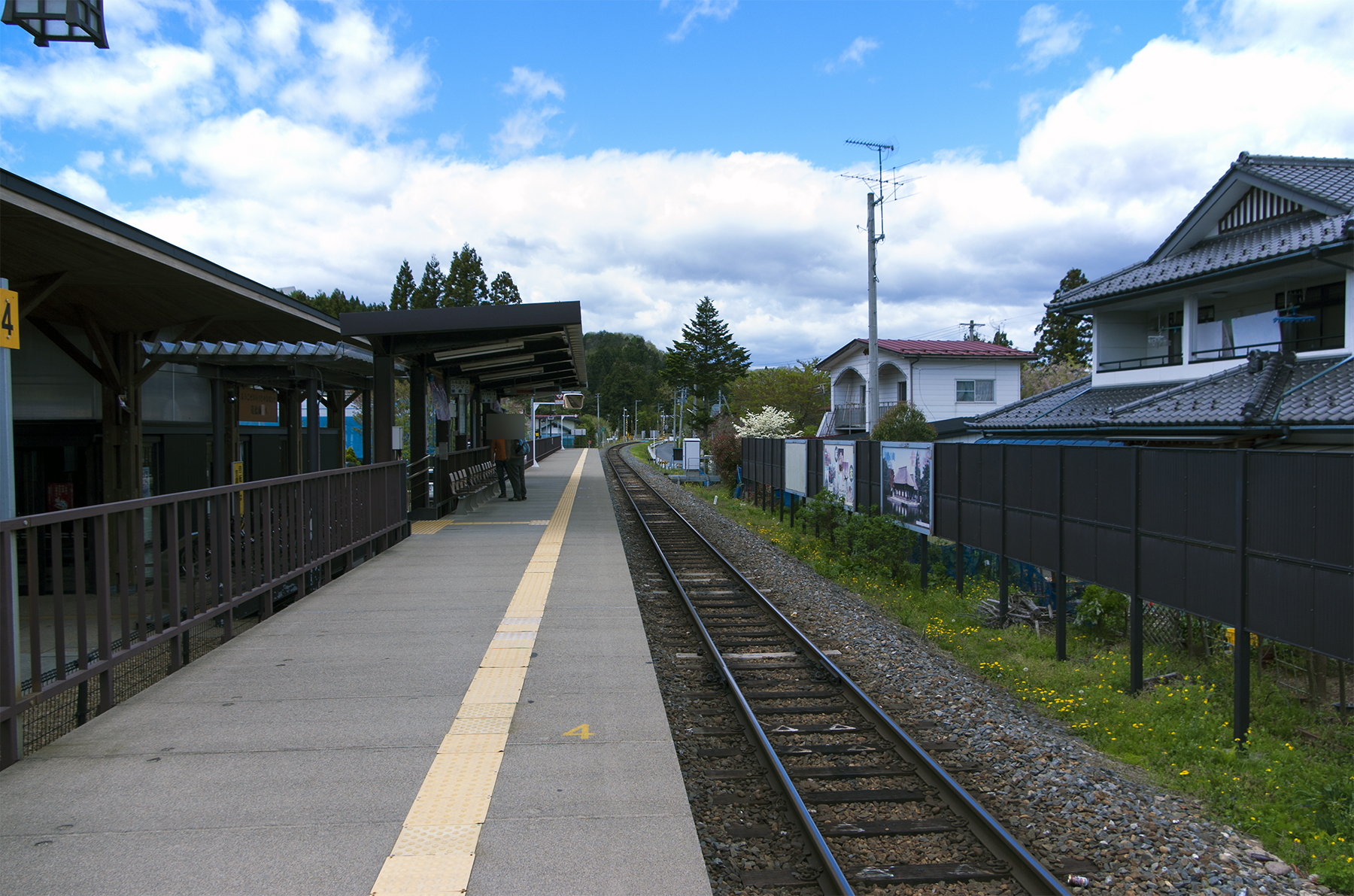 東日本旅客鉄道株式会社陸羽東線有備館駅